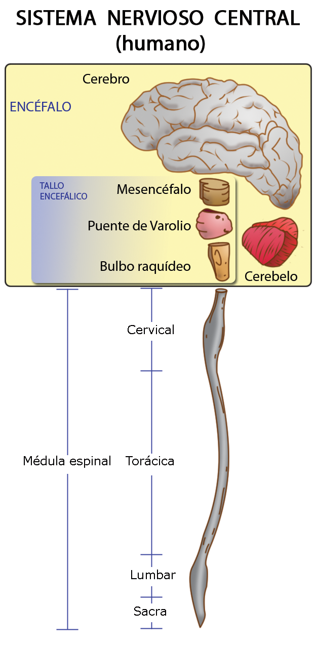 Sistema Nervioso Central Humano. Este esquema está basado en: Snell RS (2003) Neuroanatomía clínica: Panamericana. 554 p.